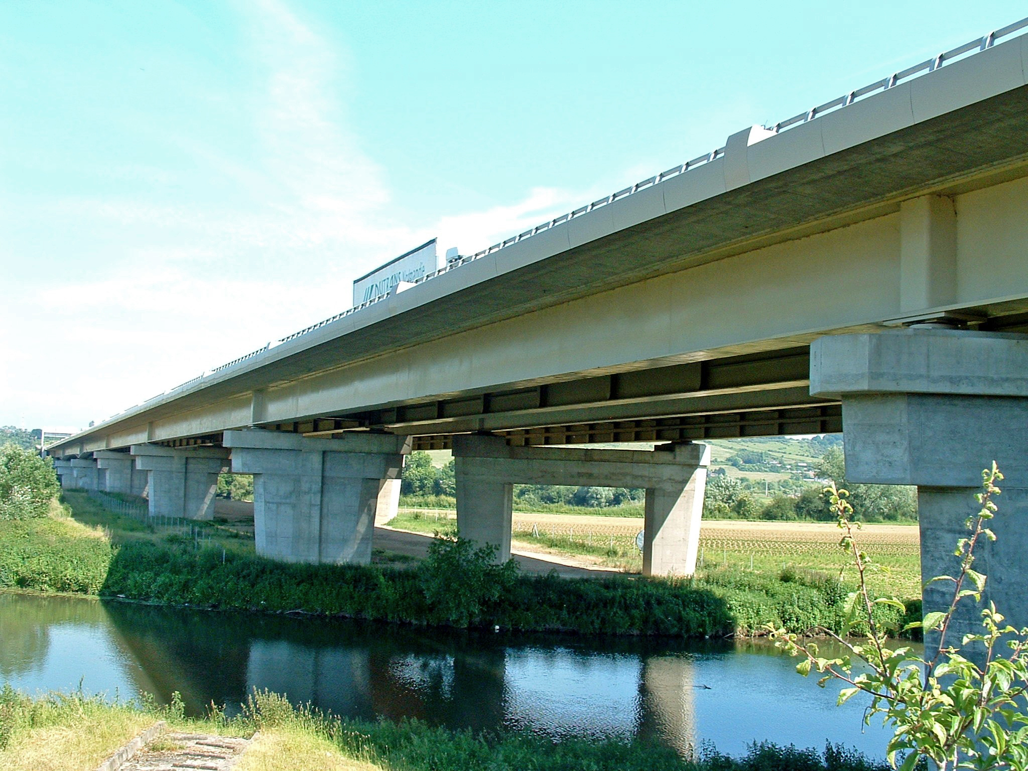 A13 - Viaduc de Criquebeuf - Doublement et ouvrage initial - Ensemble vu de l'aval en rive gauche